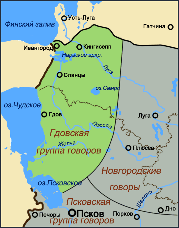 Территория распространения гдовских говоров. На основе данных: Захарова К. Ф., Орлова В. Г. Диалектное членение русского языка. М.: Наука, 1970. 2-е изд.: М.: Едиториал УРСС, 2004 Русские. Монография Института этнологии и антропологии Федеральная целевая программа Русский язык. Региональный центр НИТ ПетрГУ